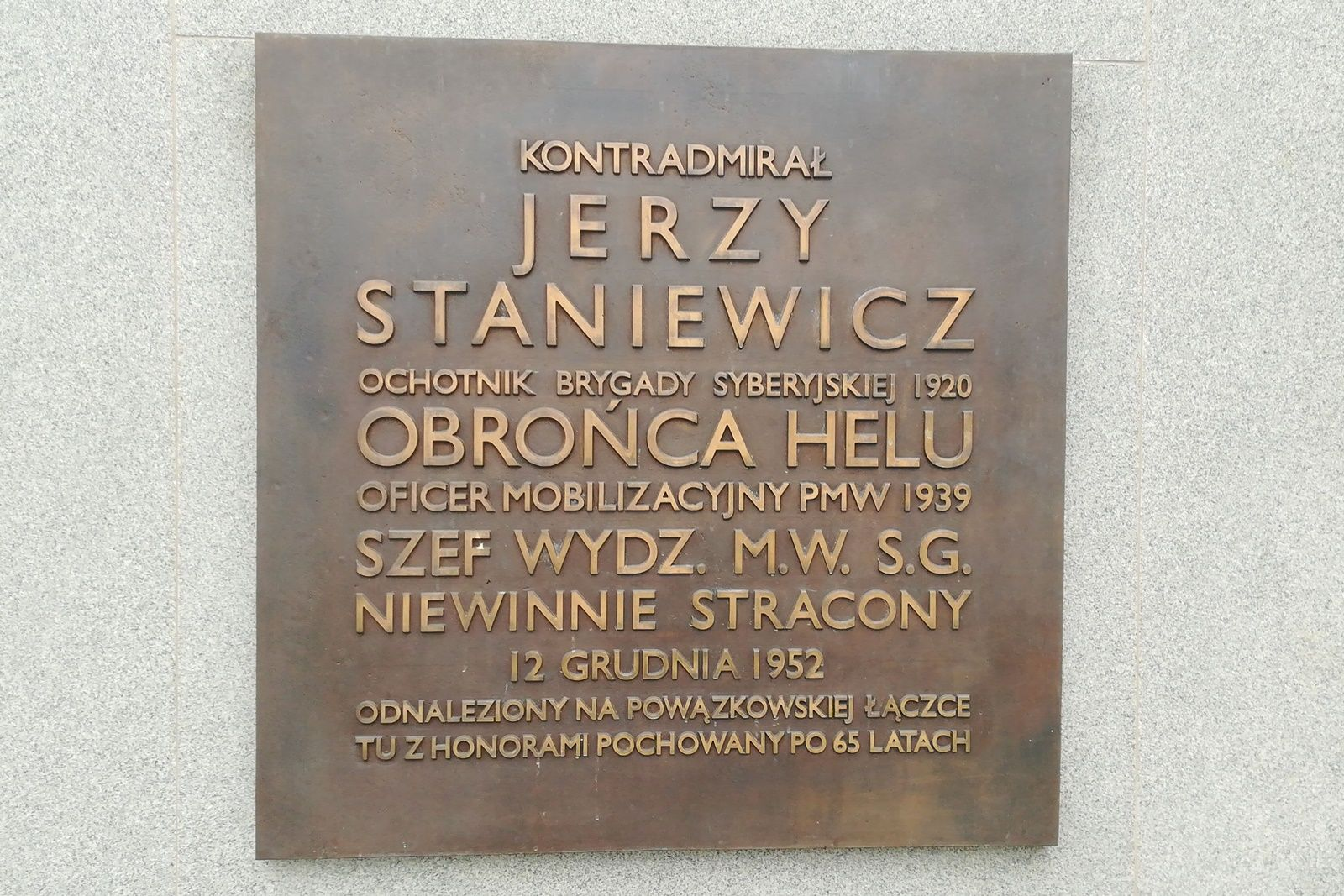 Cmentarz Marynarki Wojennej_Kwatera Pamięci_Kontradmirał Staniewicz